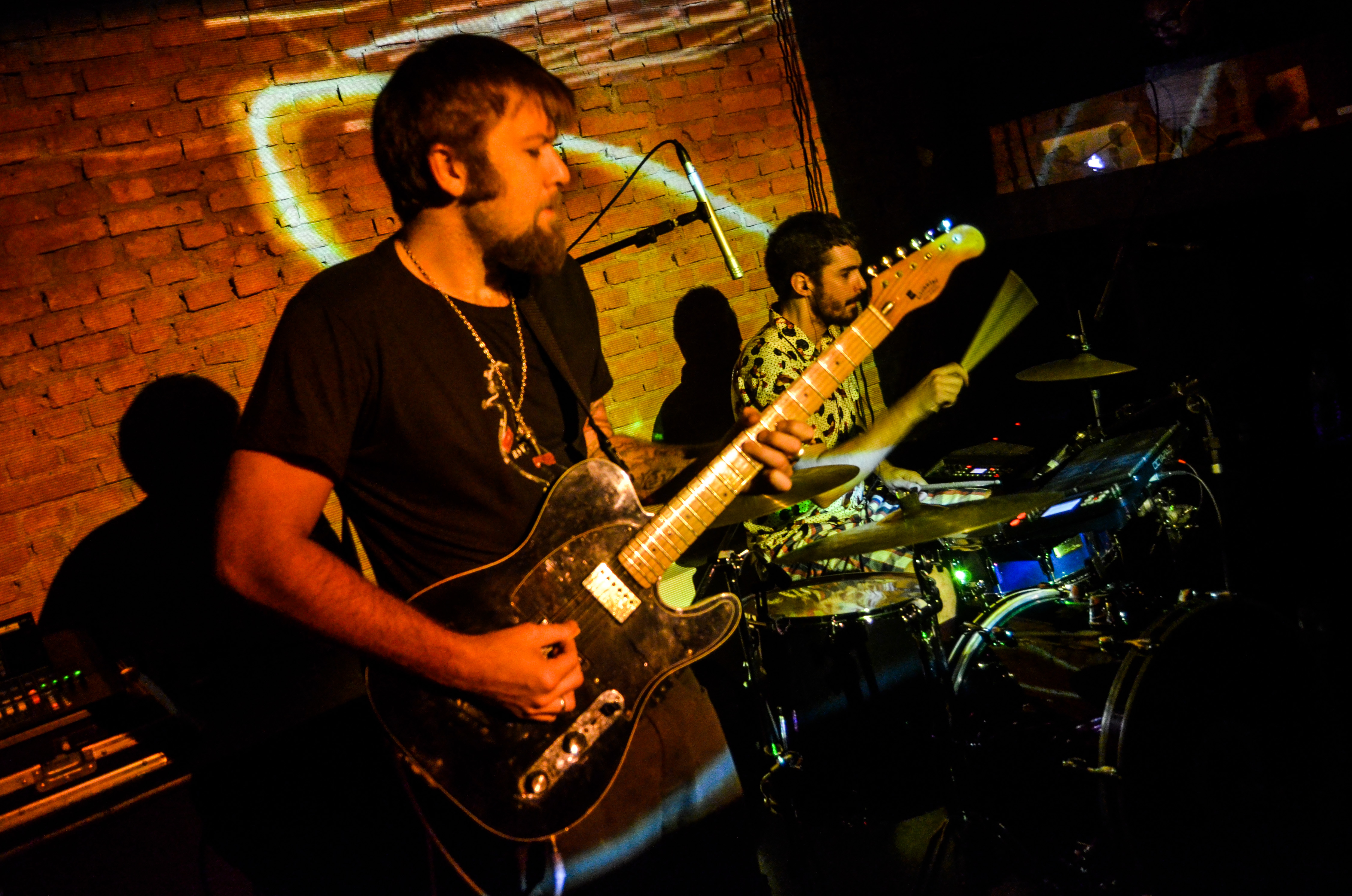 Show banda Strobo (casa de show DAMA) | São Paulo (SP) 10/10 Show da banda Strobo na casa de show DAMA a convite do Dj Tutu Moraes. (CC-BY-SA) Fora do Eixo